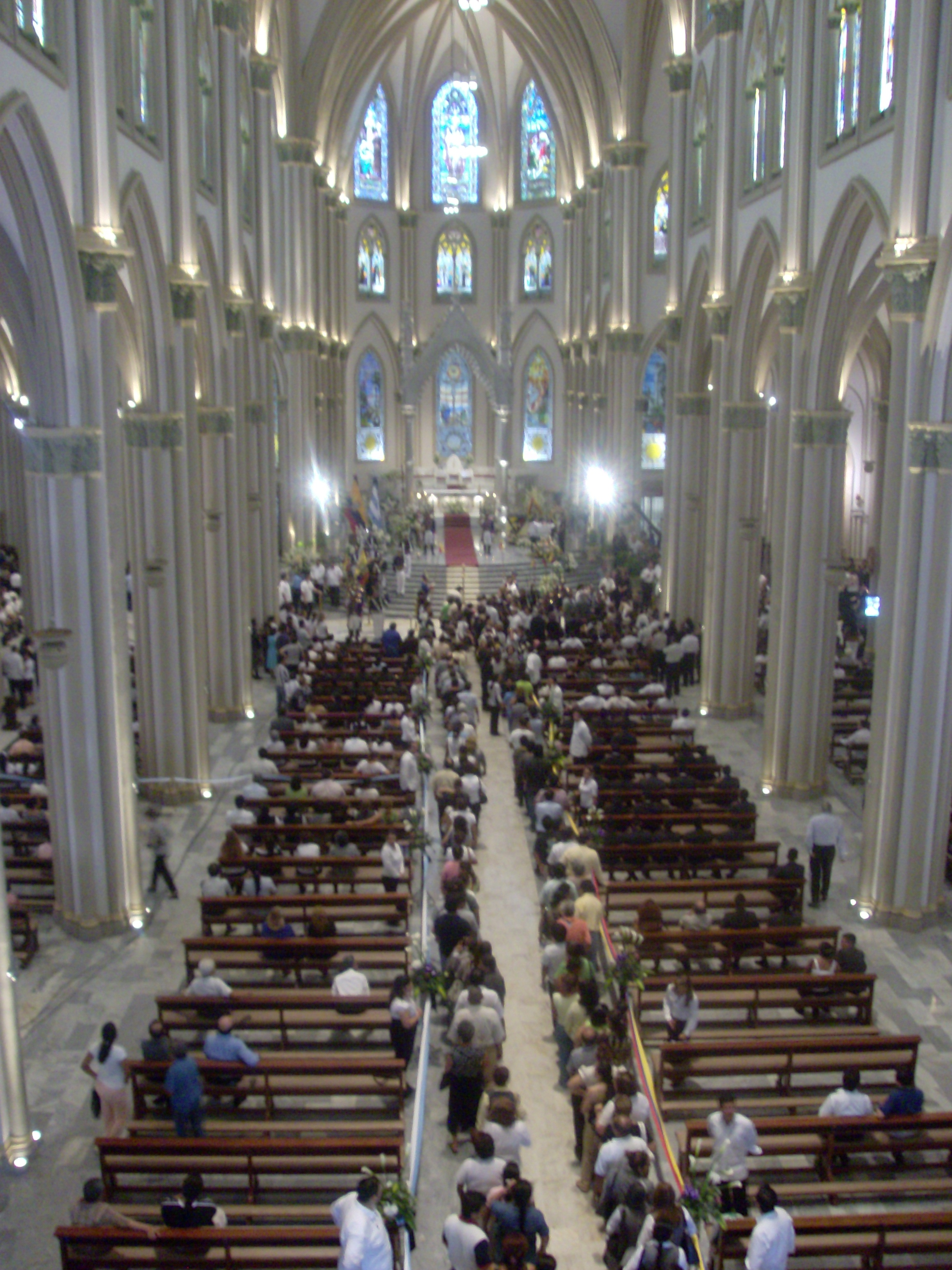 Interior de la Catedral de Guayaquil